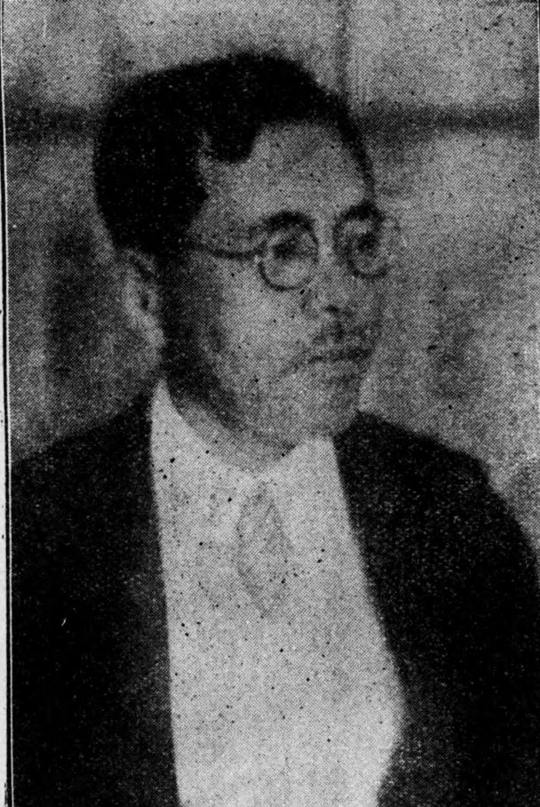 千葉勇五郎